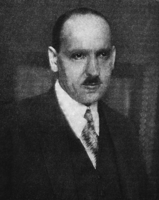 Karel Guth (1883 - 1943), Český archeolog, historik umění, muzejník a pedagog.